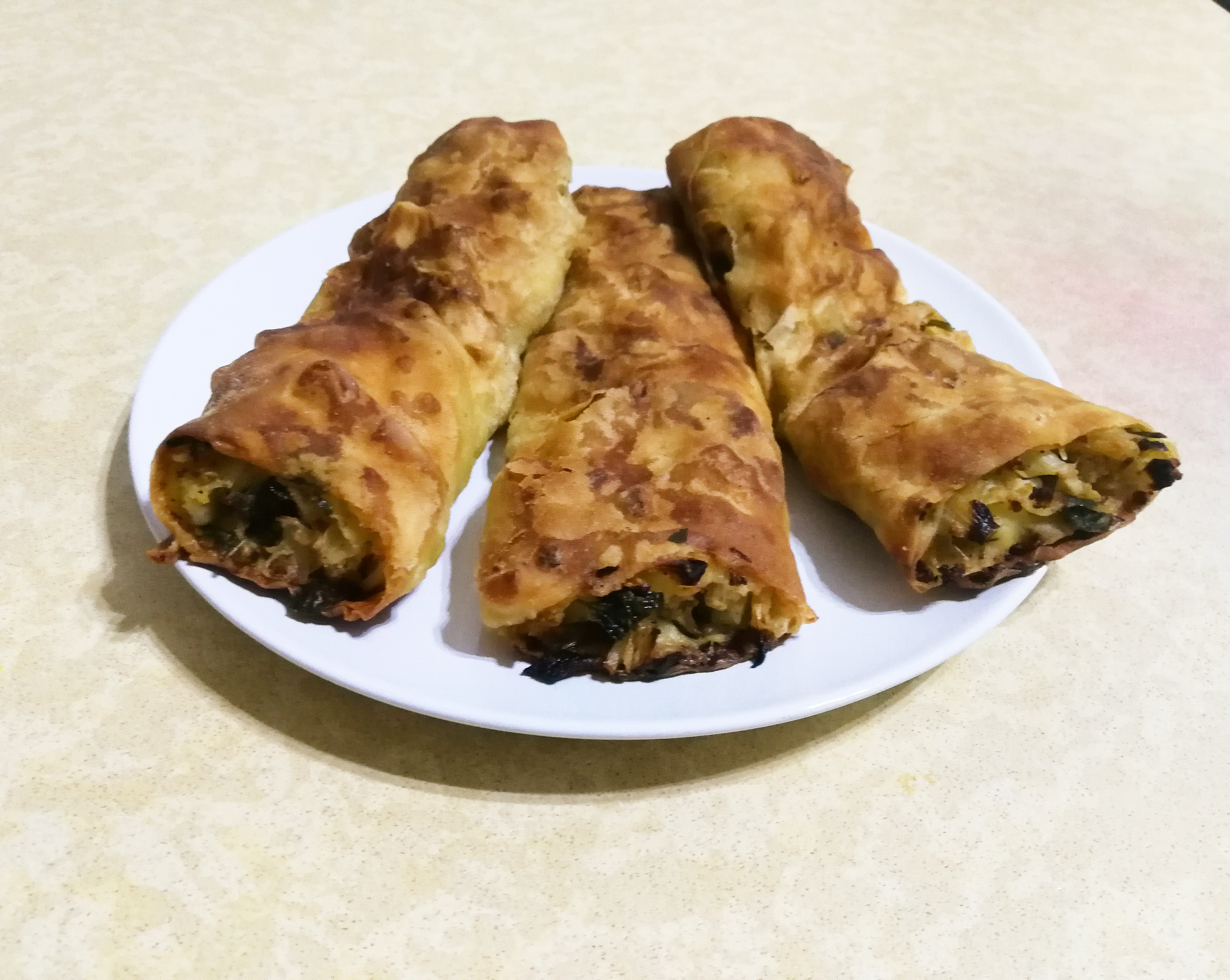 'mpanate niscemesi fatte in casa